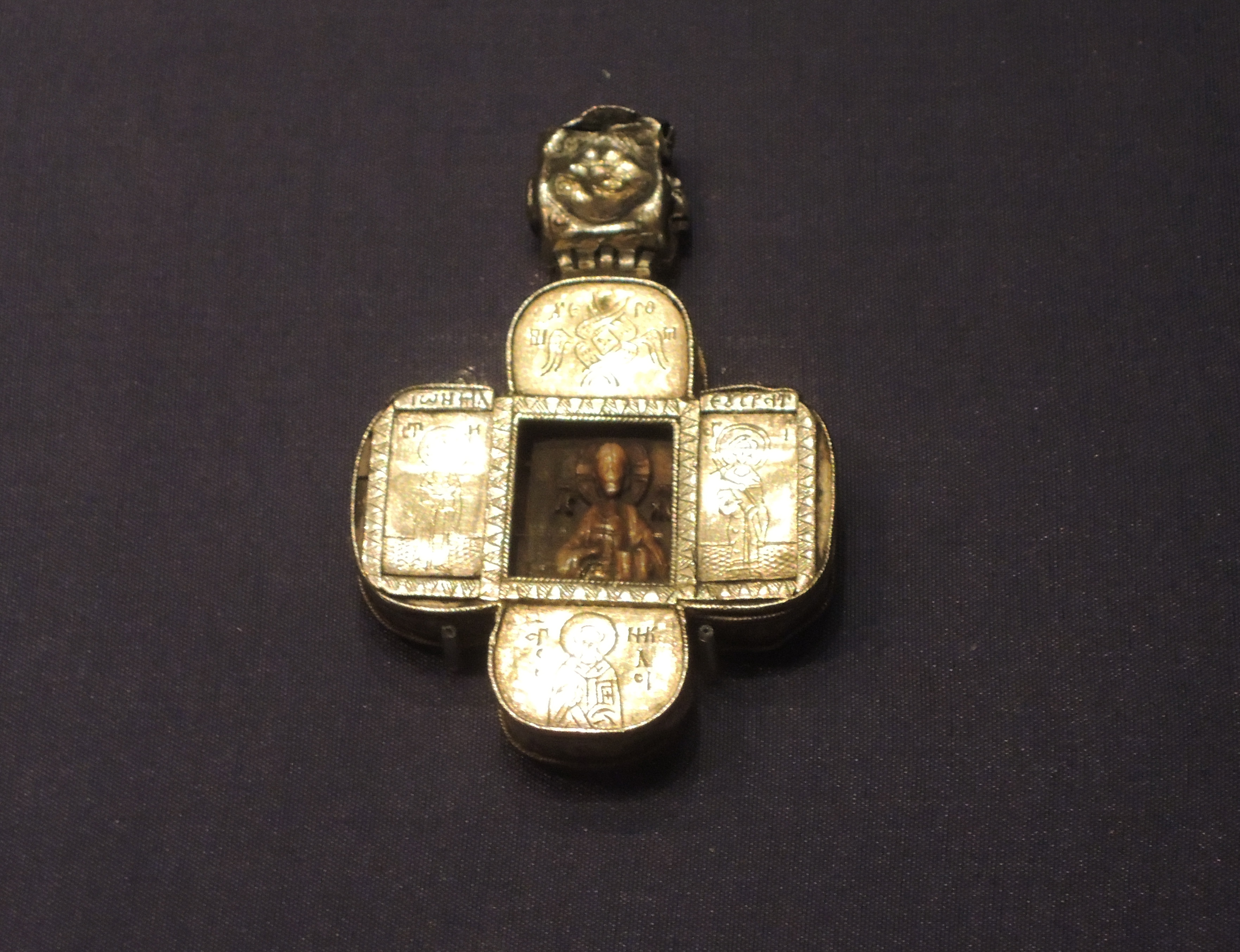 Крест-мощевик наперсный (панагия). Изображены: Спас Вседержитель, херувим, святые Иоанн Милостивый, Евстратий, Николай, Андрей Критский, Сергий (Радонежский ?), Екатерина; Спас Нерукотворный, серафим Москва, великокняжеская мастерская, 1470-е гг. Кость, серебро; резьба, золочение. Происходит из Благовещенского собора Московского Кремля. Сохранилось несколько драгоценных мощевиков, проиходящих из Благовещенского собора. По надписям можно предположить, что именно эти святыни привезла София Палеолог. Хранившиеся в них мощи многих святых, очевидно, были привезены из Рима.